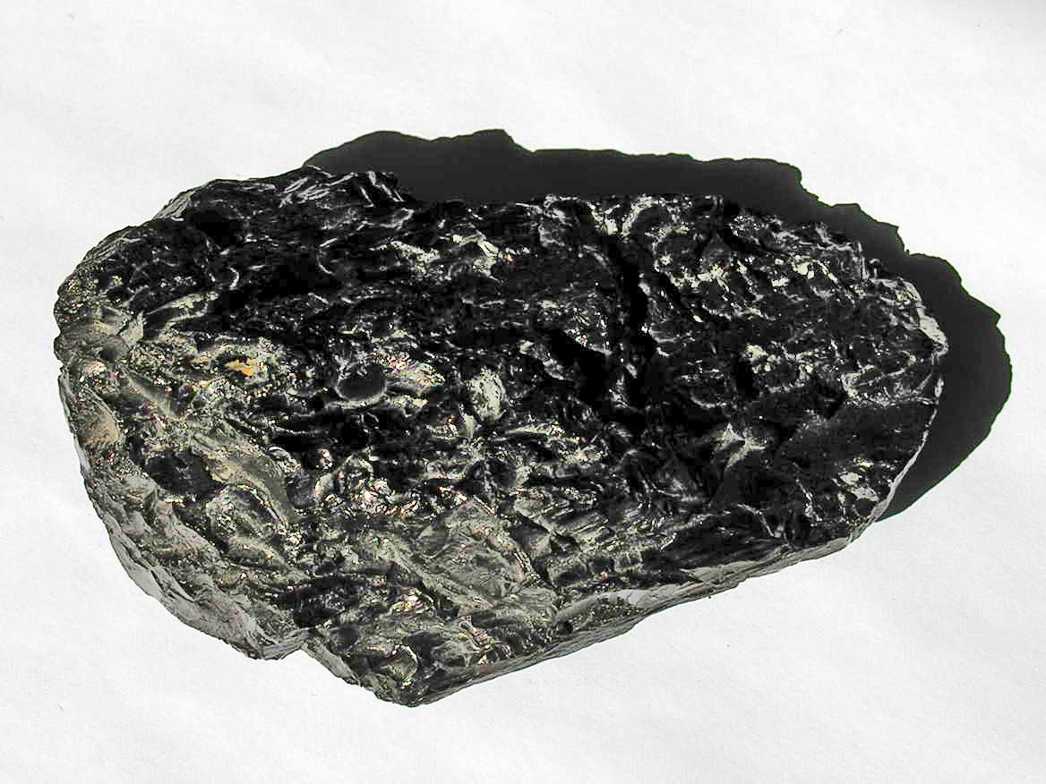 Sujet:Anthrazit